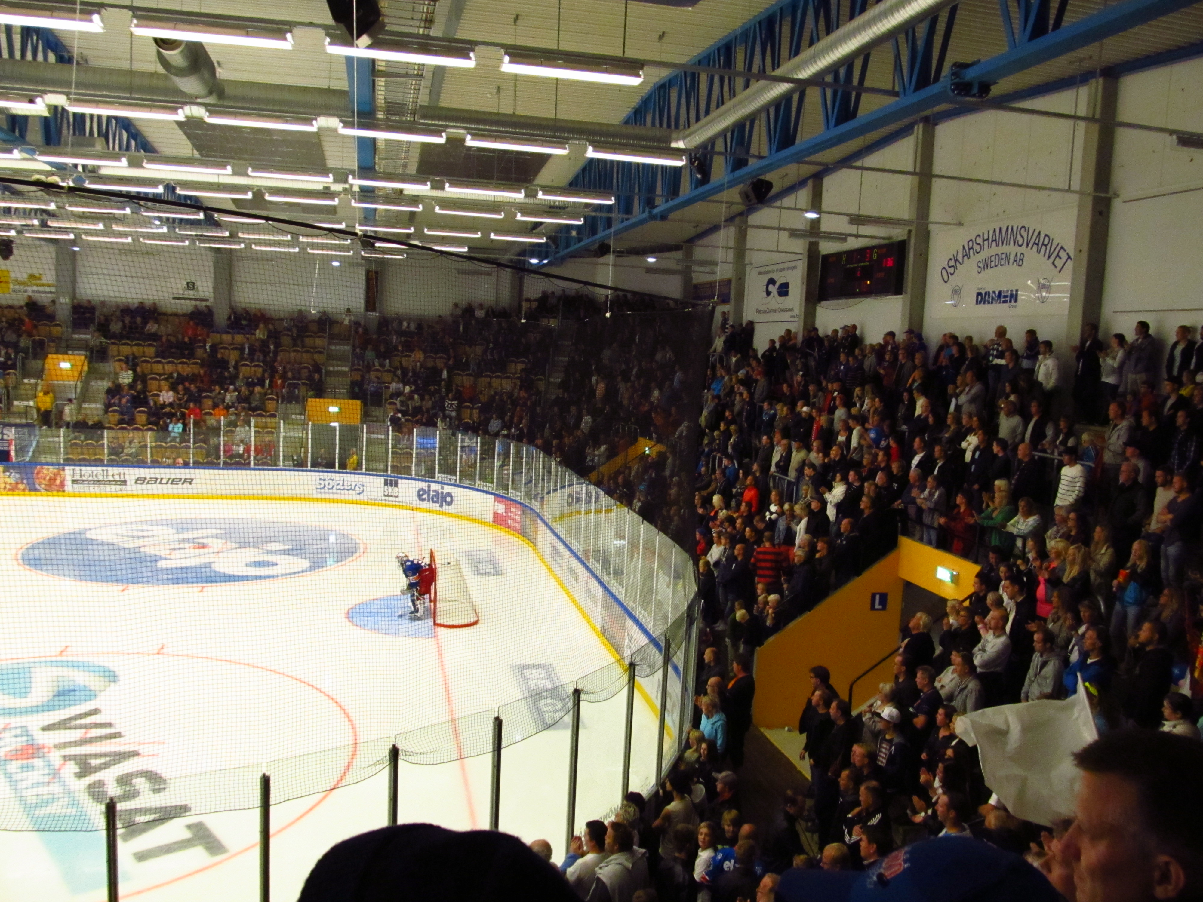 Match i Arena Oskarshamn den 16 september 2013 mellan IK Oskarshamn och Asplöven i Hockeyallsvenskans grundserie 2013/14. Målvåkten i IK Oskarshamn på bilden: Zajkowski, Michal.